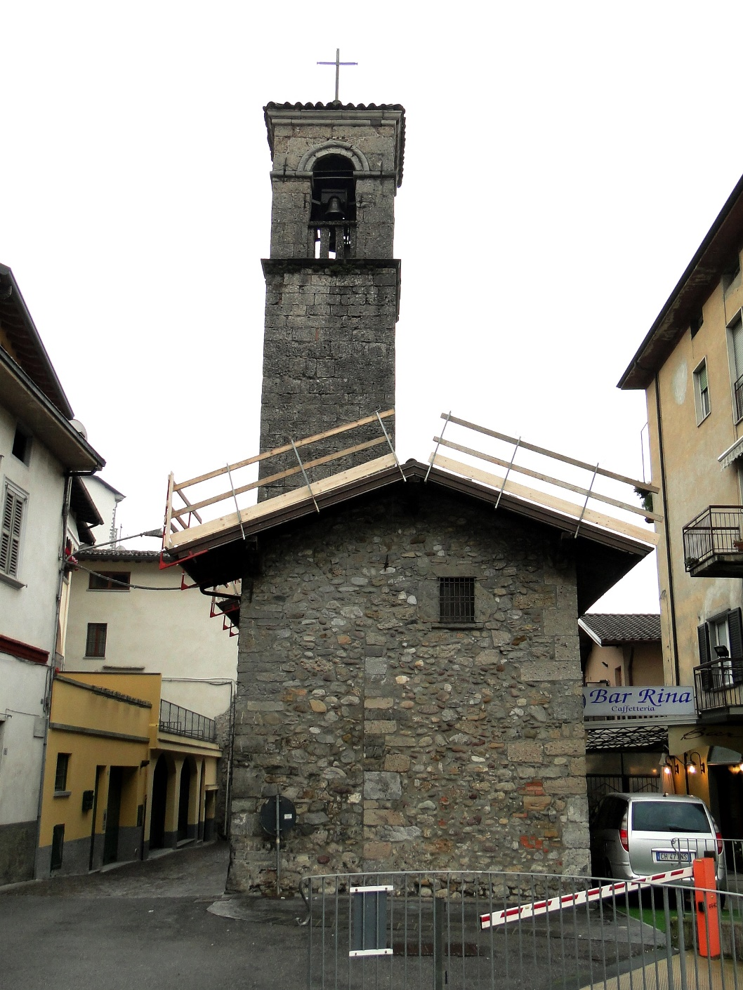 Chiesa di San Lorenzo. Vertova (BG). Italia